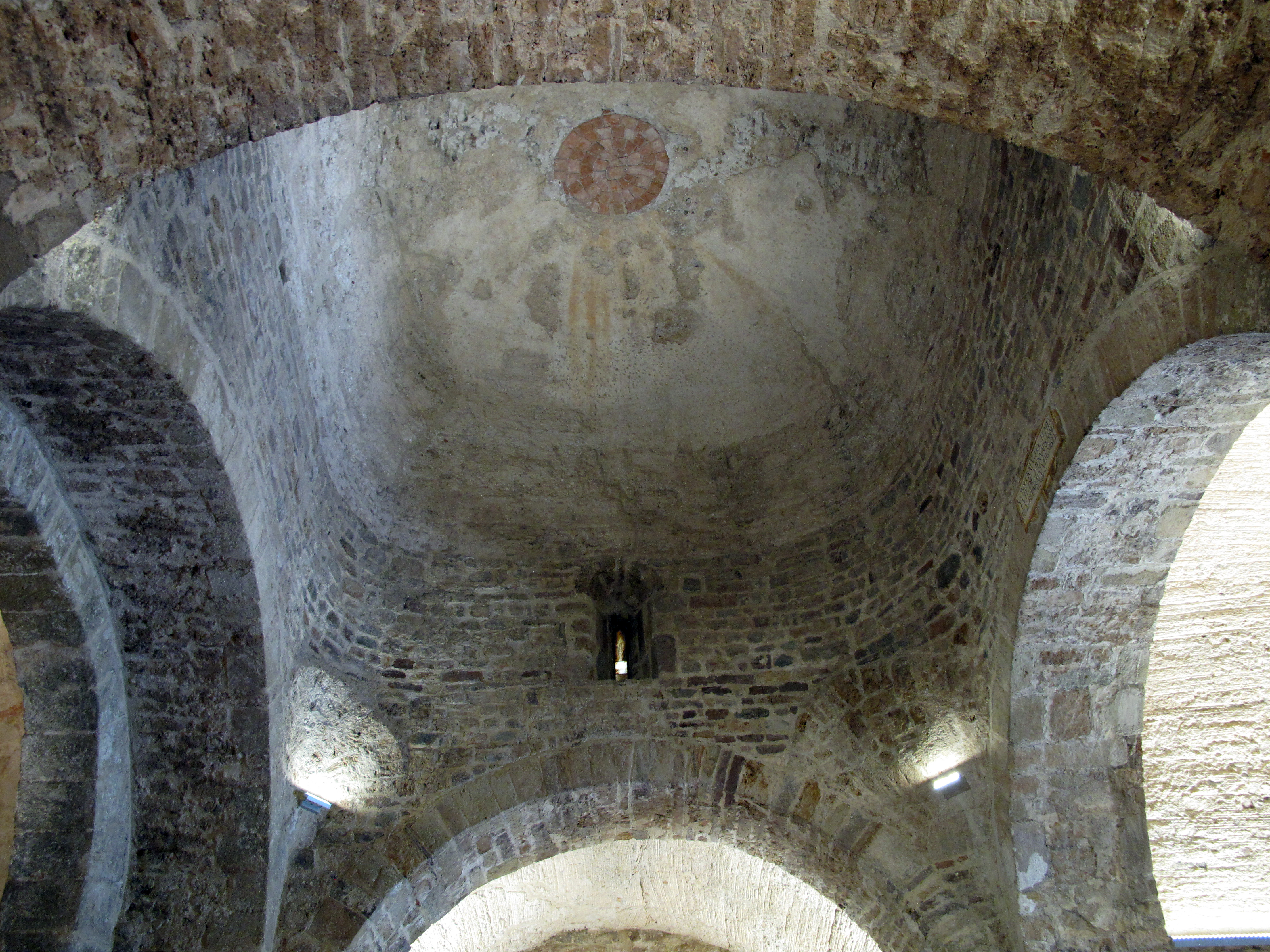 Santa Maria de Terrassa